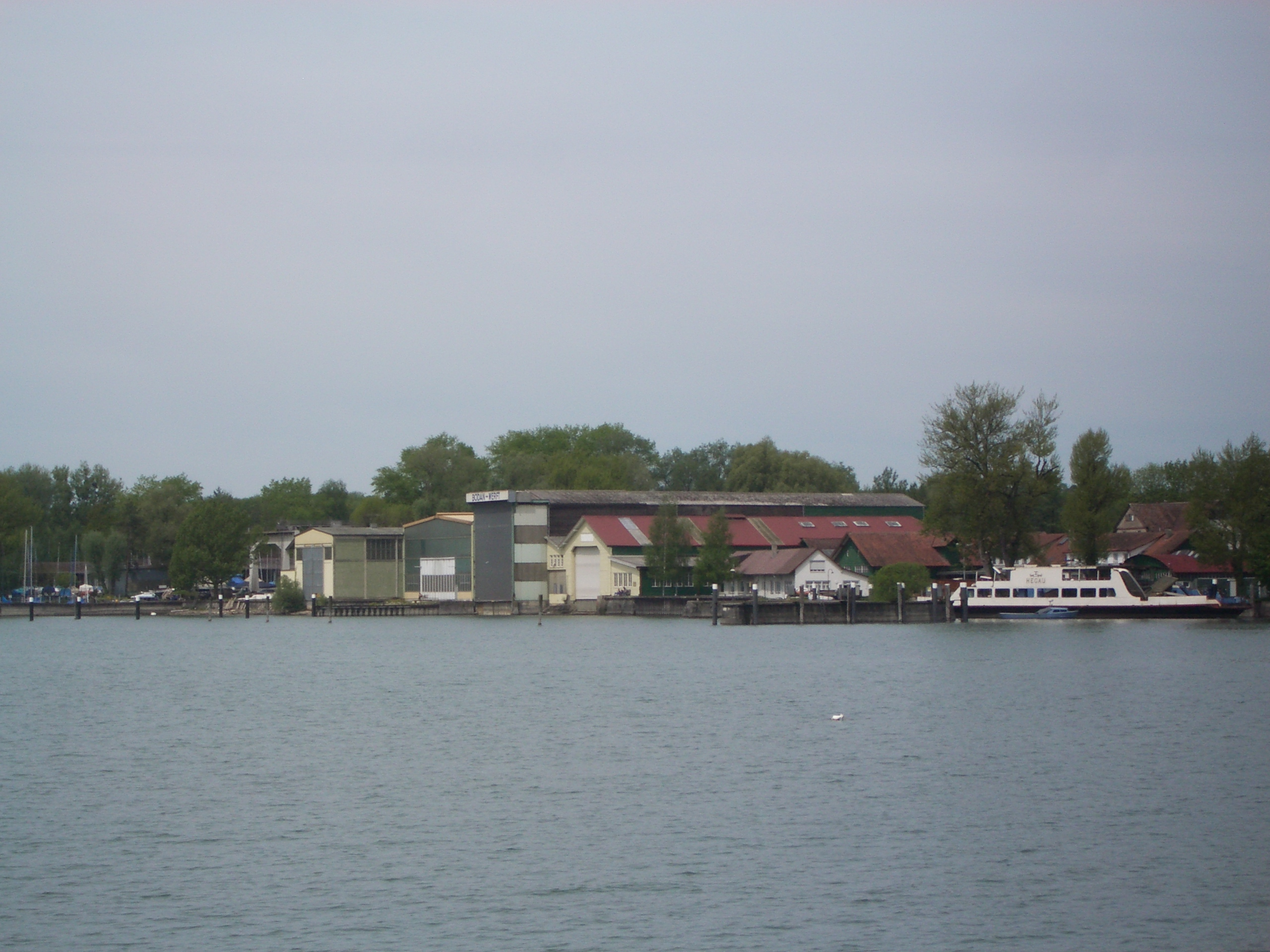 Bodan-Werft in Kressbronn am Bodensee, Baden-Württemberg